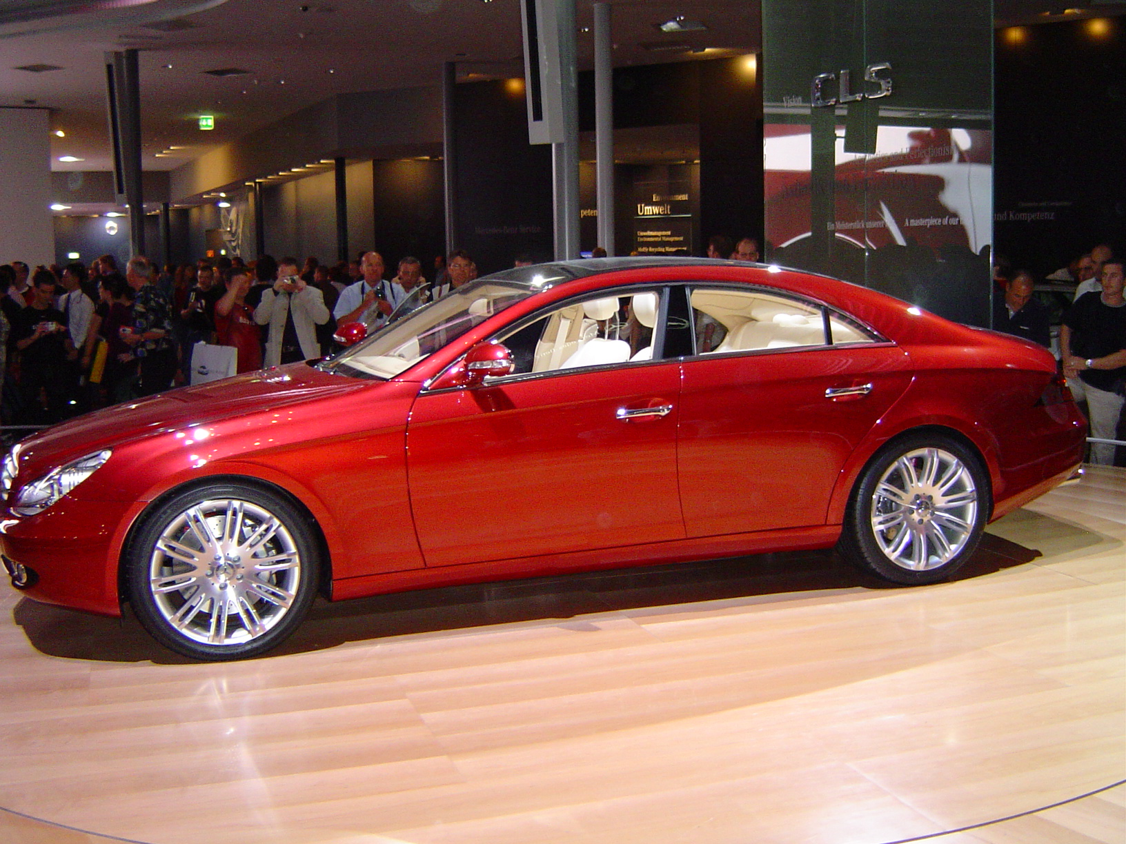 Mercedes Benz - Vision CLS